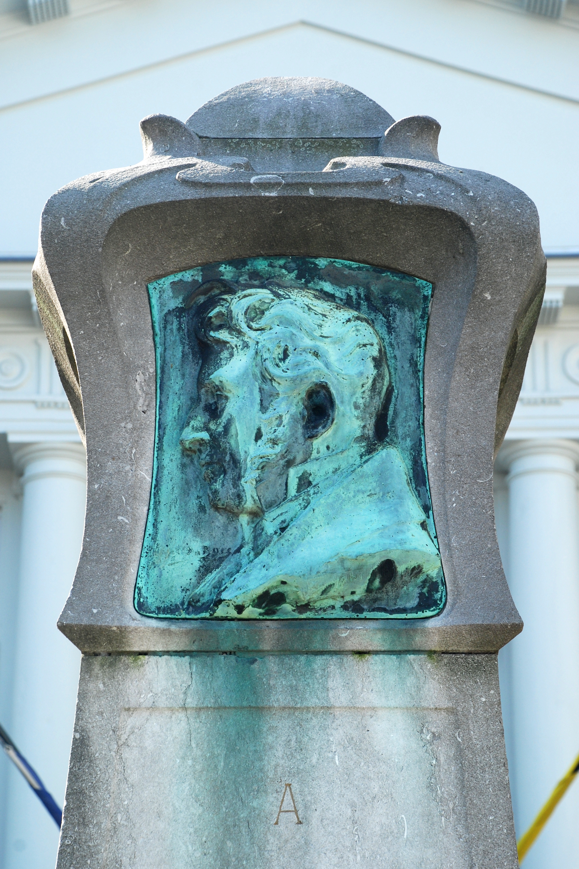 Belgique - Bruxelles - Monument au comte Frédéric de Mérode